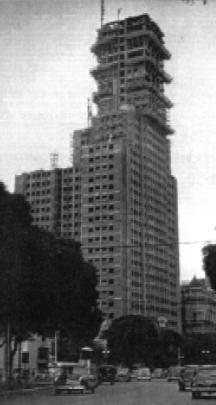 Edificio Alas en construcción, inaugurado en 1957. Buenos Aires, Argentina.